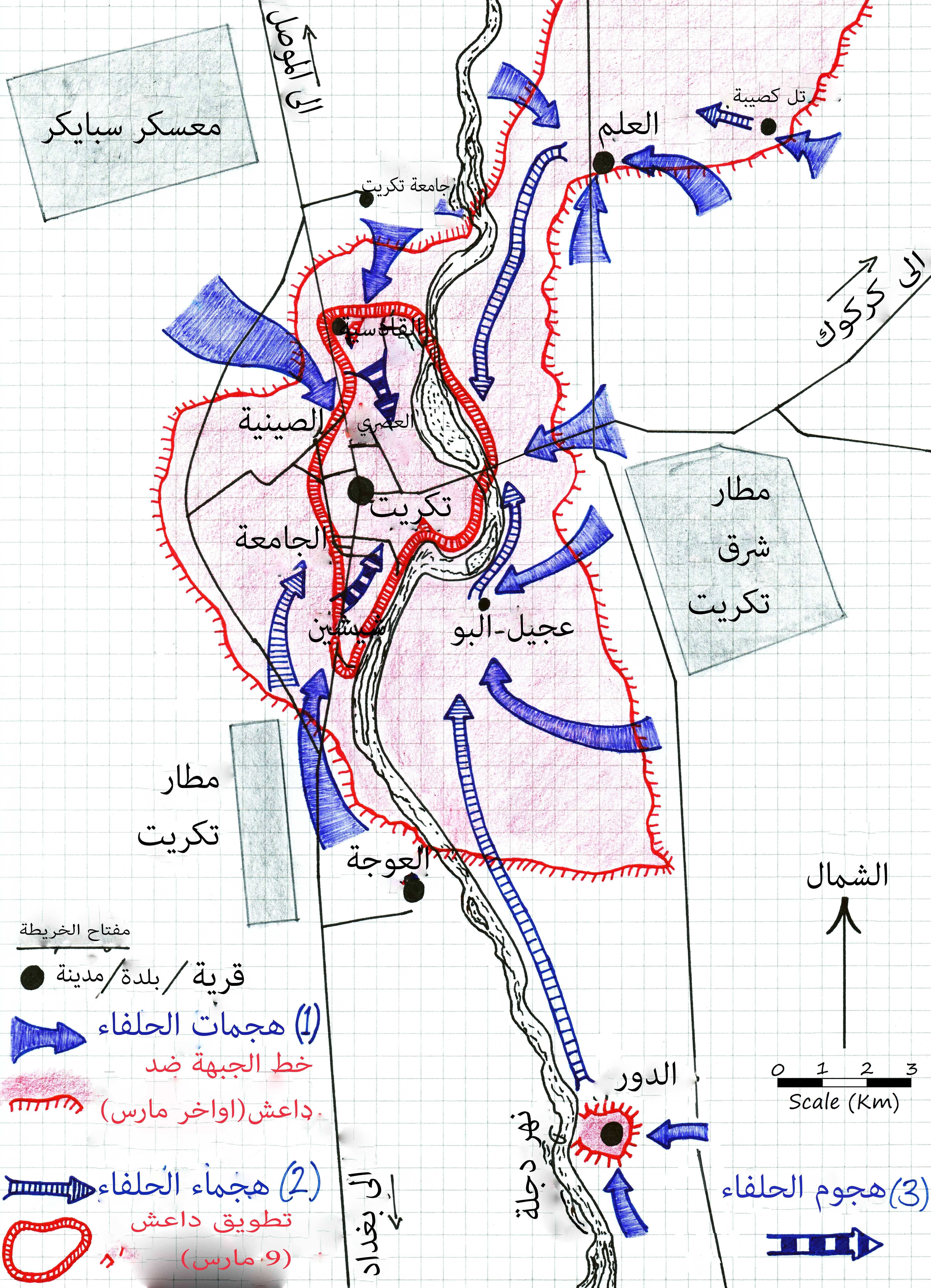 معركة تكريت الثانية معركة تحرير تكريت